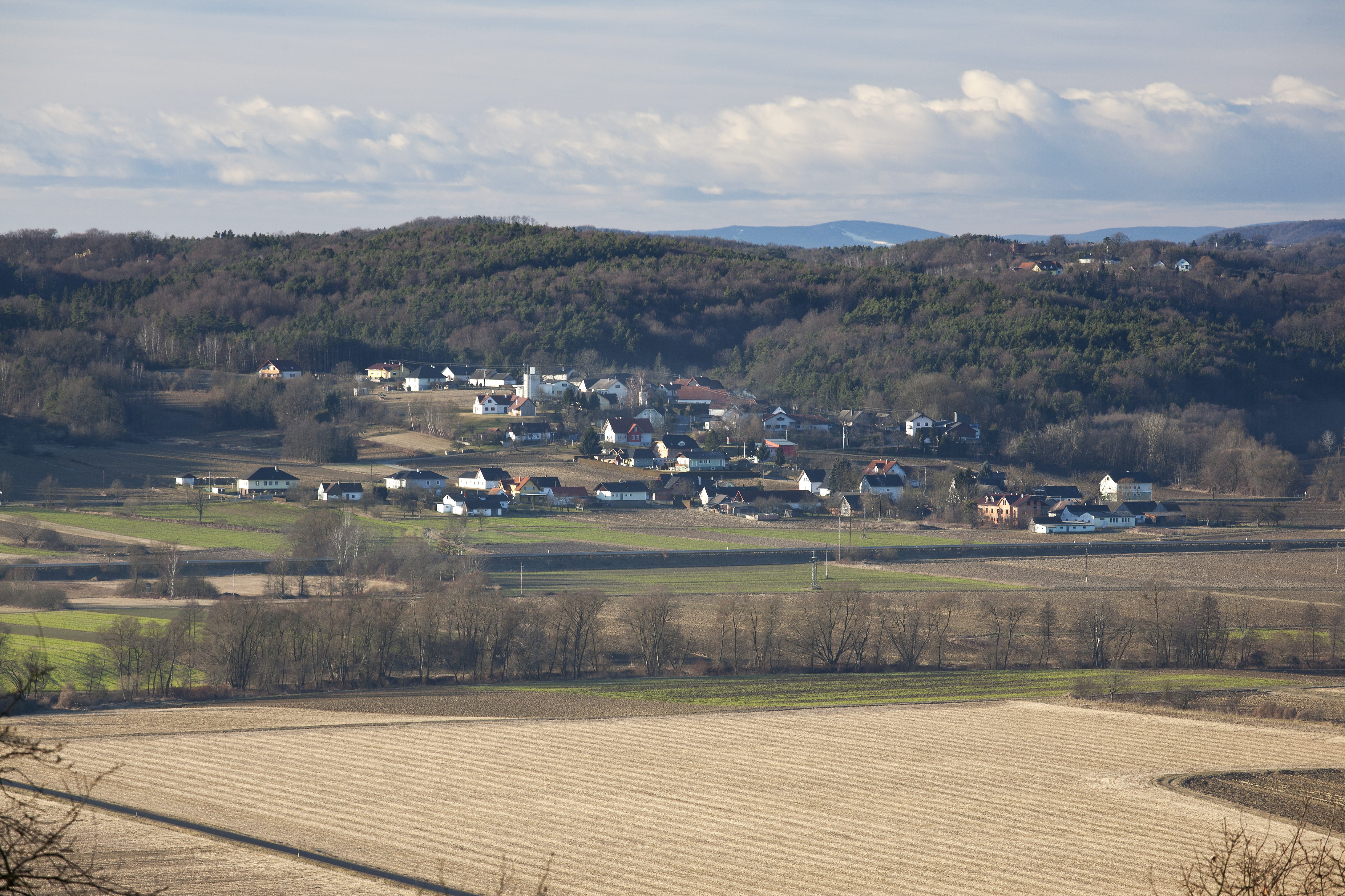 Gritsch ist ein Ortsteil der Marktgemeinde Sankt Martin an der Raab, im südburgenländischen Bezirk Jennersdorf